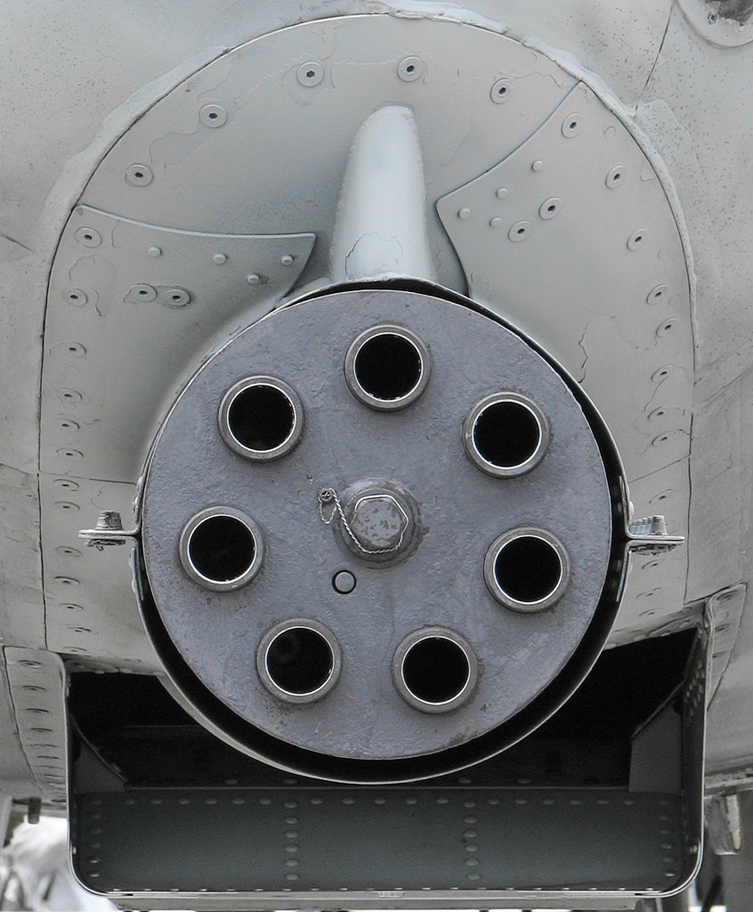 Description/Beschreibung: Mündungsrohre einer General Electric GAU-8/A Avenger, verbaut in einer Fairchild-Republic A-10 auf der ILA 2006 in Berlin General Electric GAU-8/A Avenger in an A-10 Thunderbolt on display at the ILA 2006 in Berlin / Germany Author/Fotograf: Darkone, 20. Mai 2006